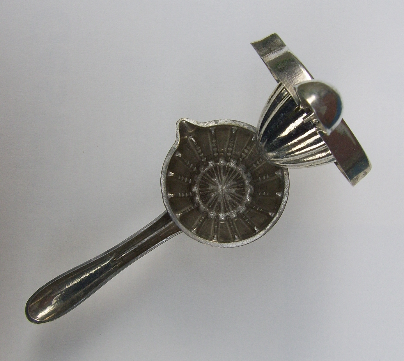 Westmark_Limona_Zitronenzange,_ca._1970, geöffnet, Author Anima, March 2007, samsung digimax v 700